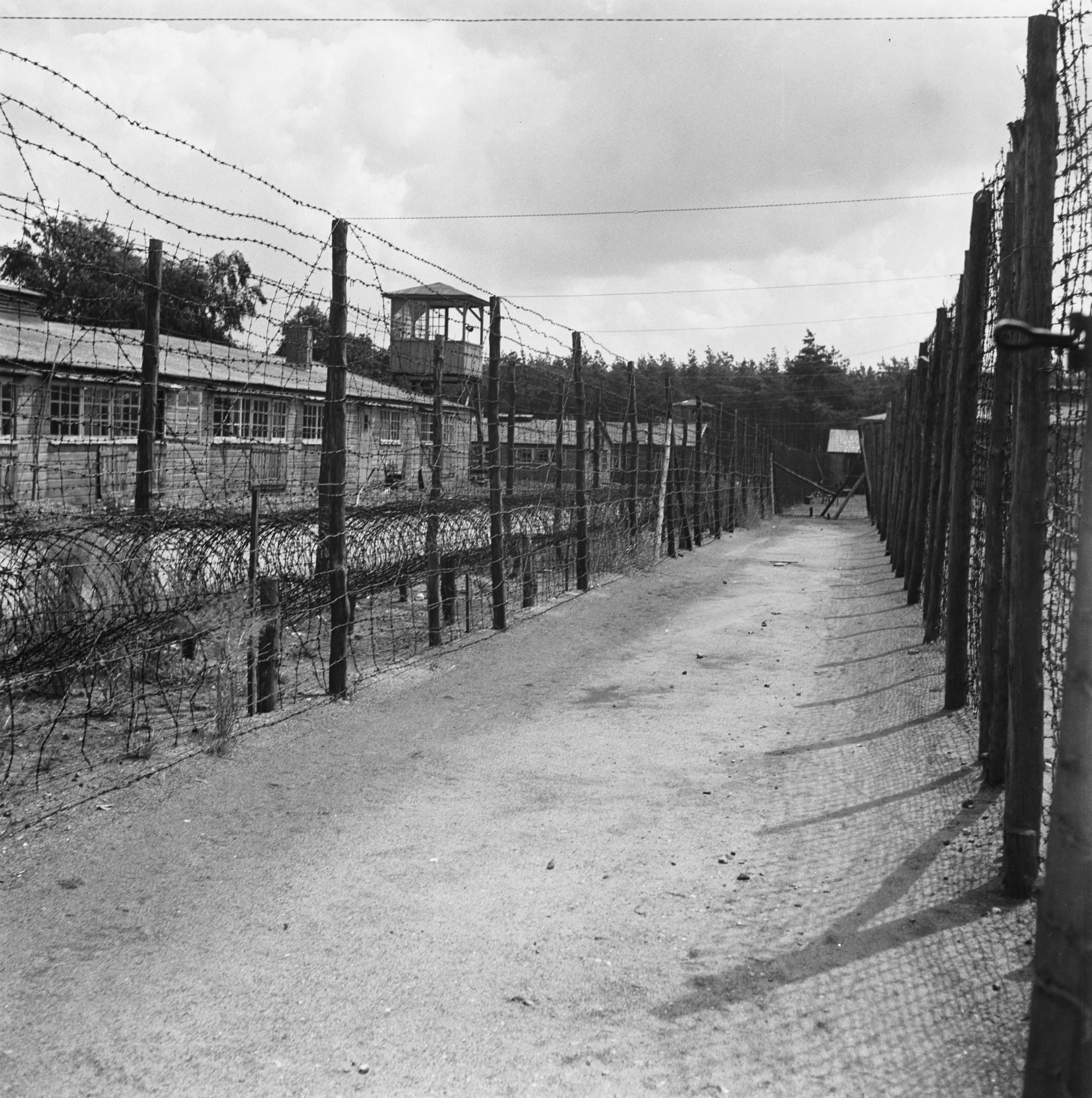 Kamp Amersfoort: Hekwerken, barak, uitkijktoren